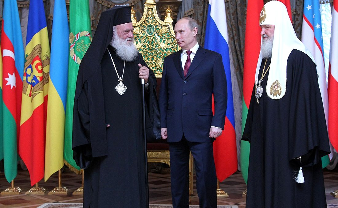 Встреча Владимира Путина с Патриархом Московским и всея Руси Кириллом и архиепископом Афинским и всея Эллады Иеронимом II